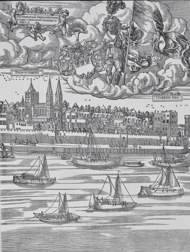 Kupferstich: Kölner Stadtansicht (1531)